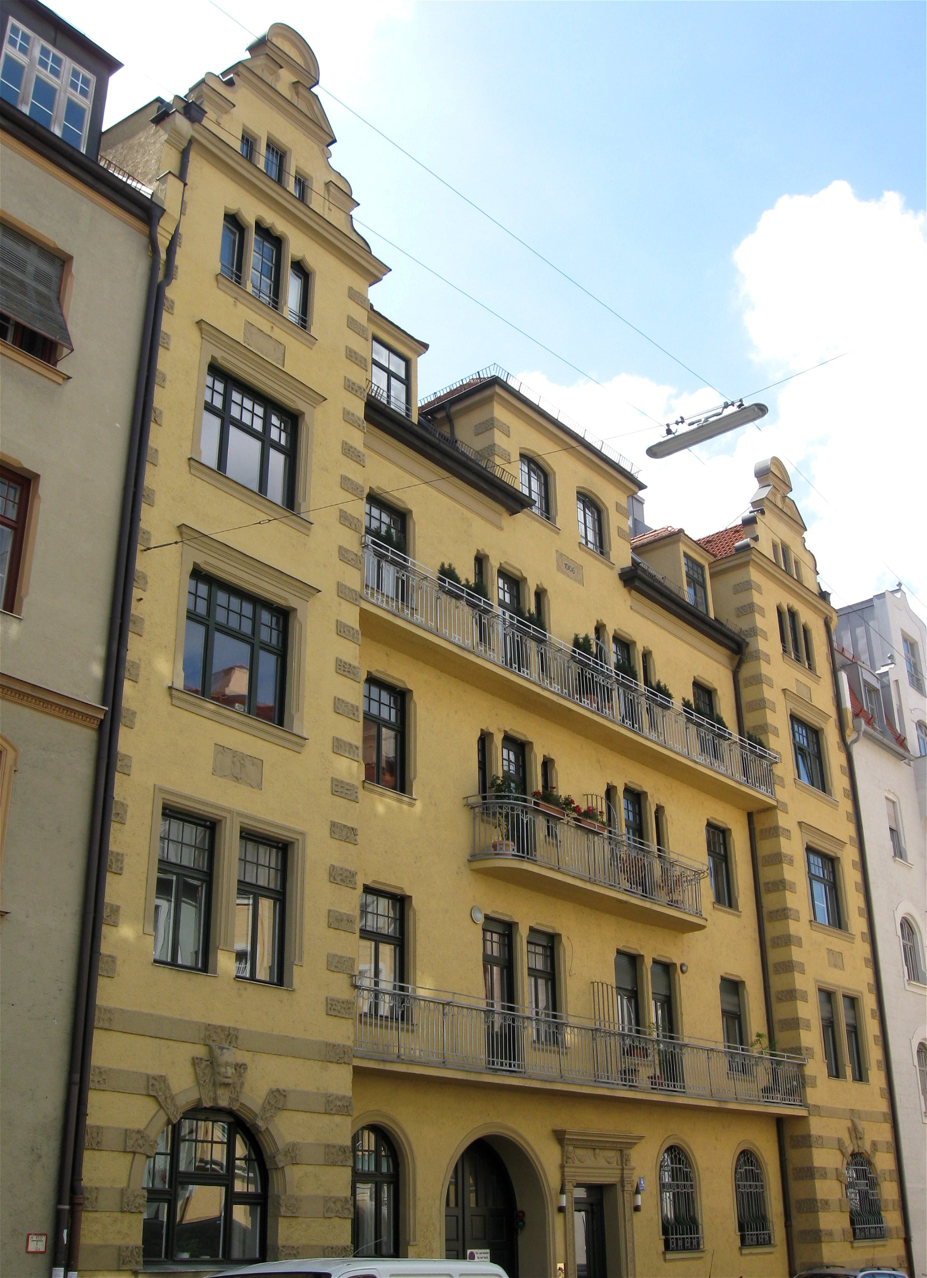 Liebherrstraße 4; Mietshaus, deutsche Renaissance, reich gegliedert mit zwei Risaliten, Balkonbändern und plastischem Dekor, 1905-06 von Konrad Böhm nach modifiziertem Vorentwurf von Adolf Wentzel.